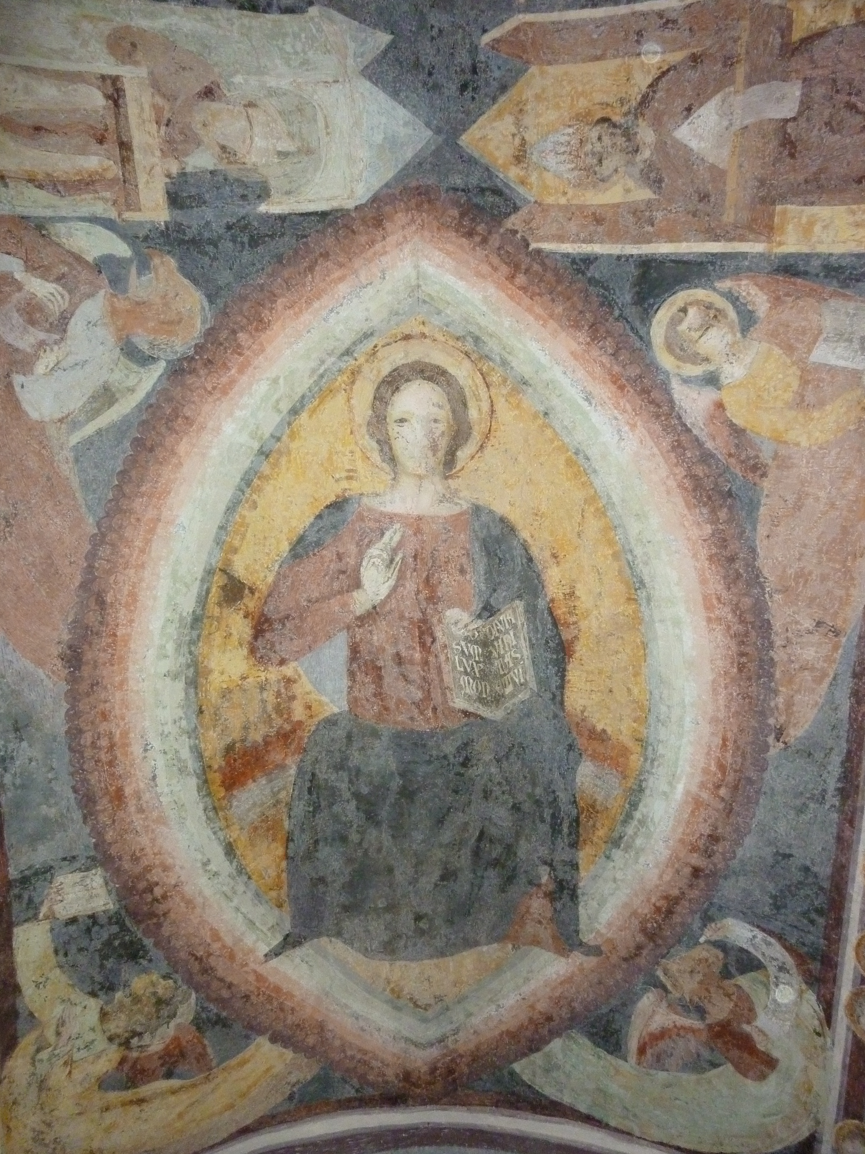 Reformierte Kirche Stugl: Christus in Mandorla